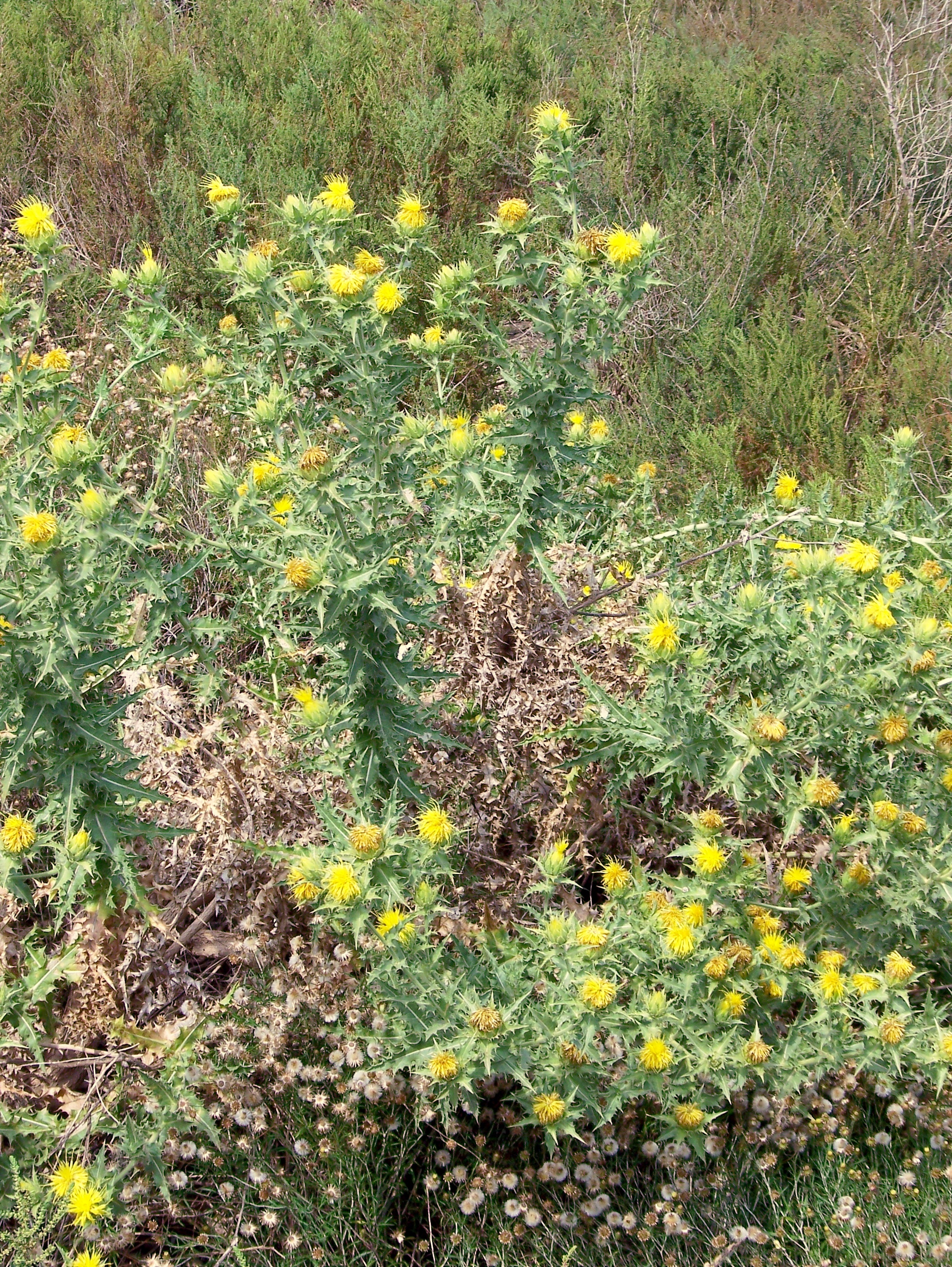 Carthamus arborescens : Vista general - Camino de la Azarbe de Patricio, Albatera (Alicante, España).